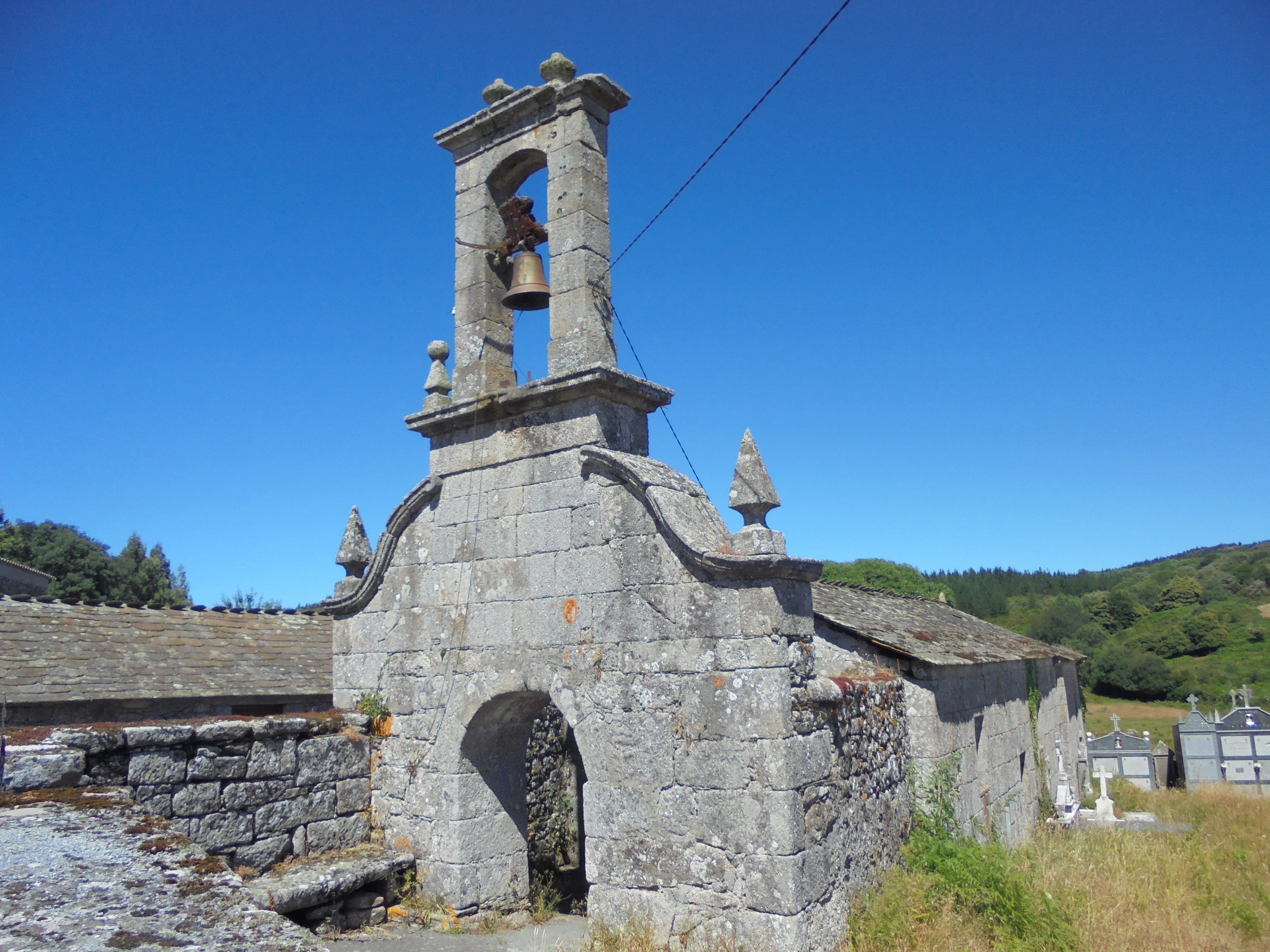 Igrexa parroquial de Labio ( Lugo)